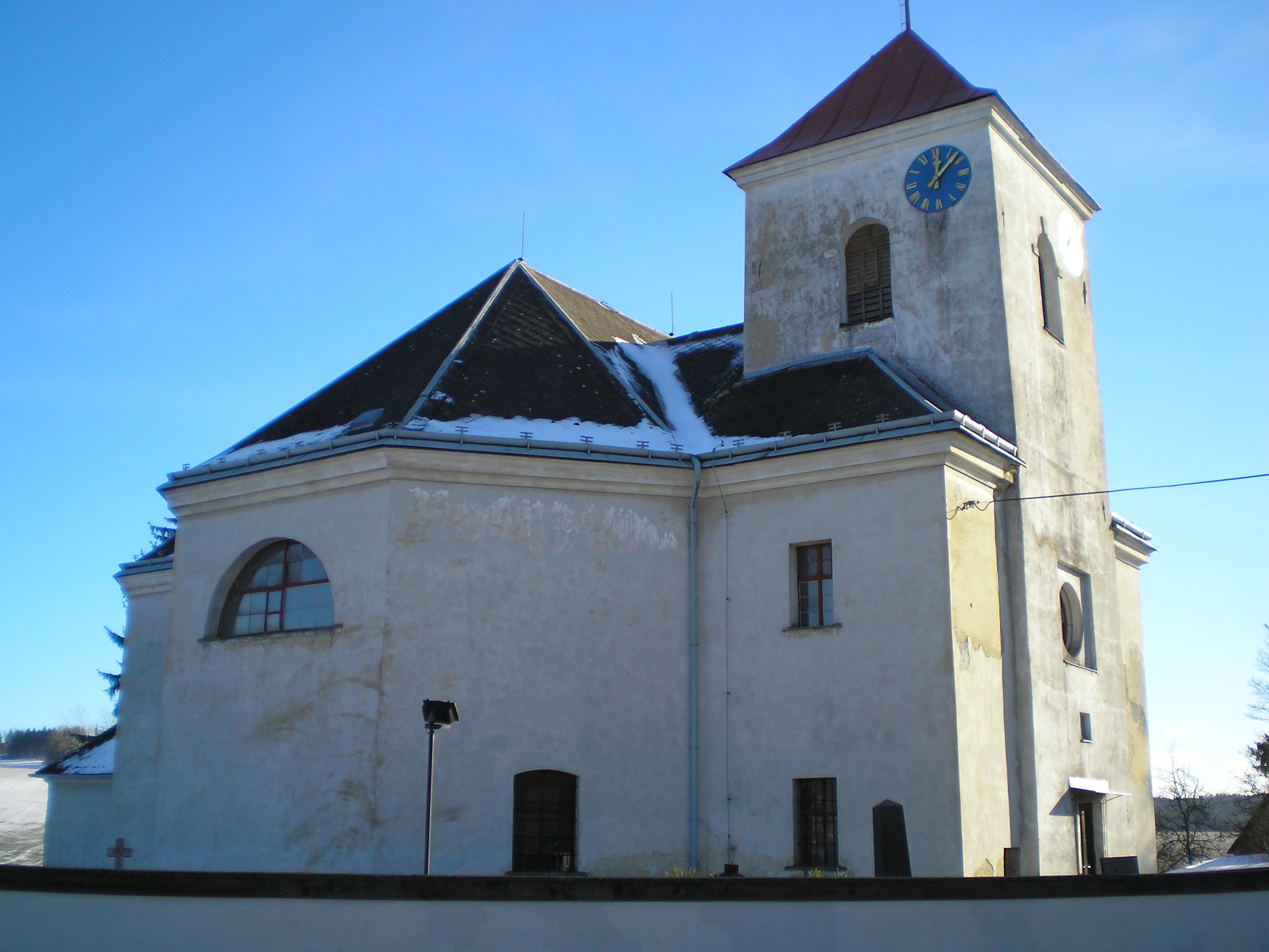 Moravskoslezský Kočov, kostel sv. Michala